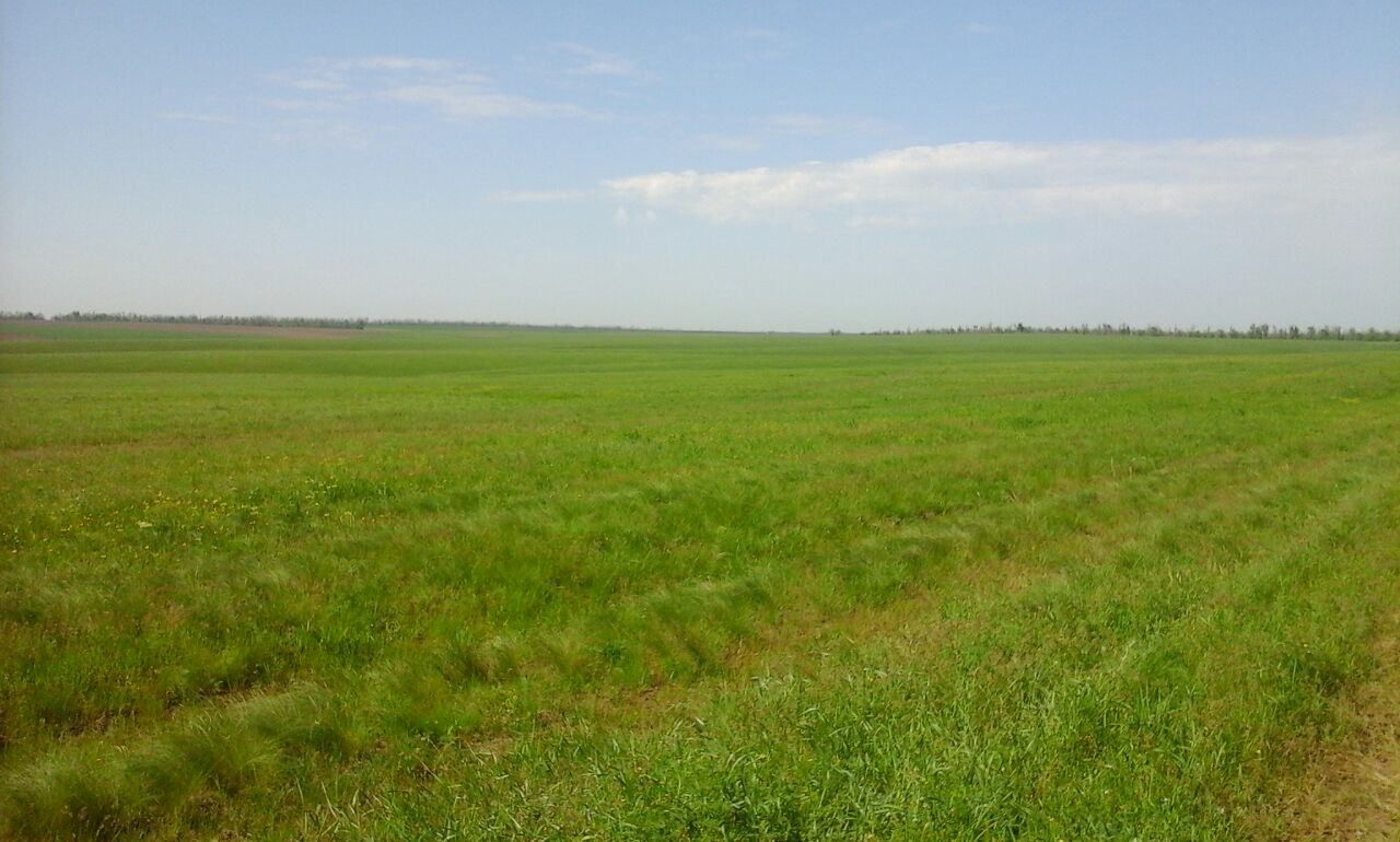 Сальская степь, Сальский район This image is related to the protected area of Russia number 6110132